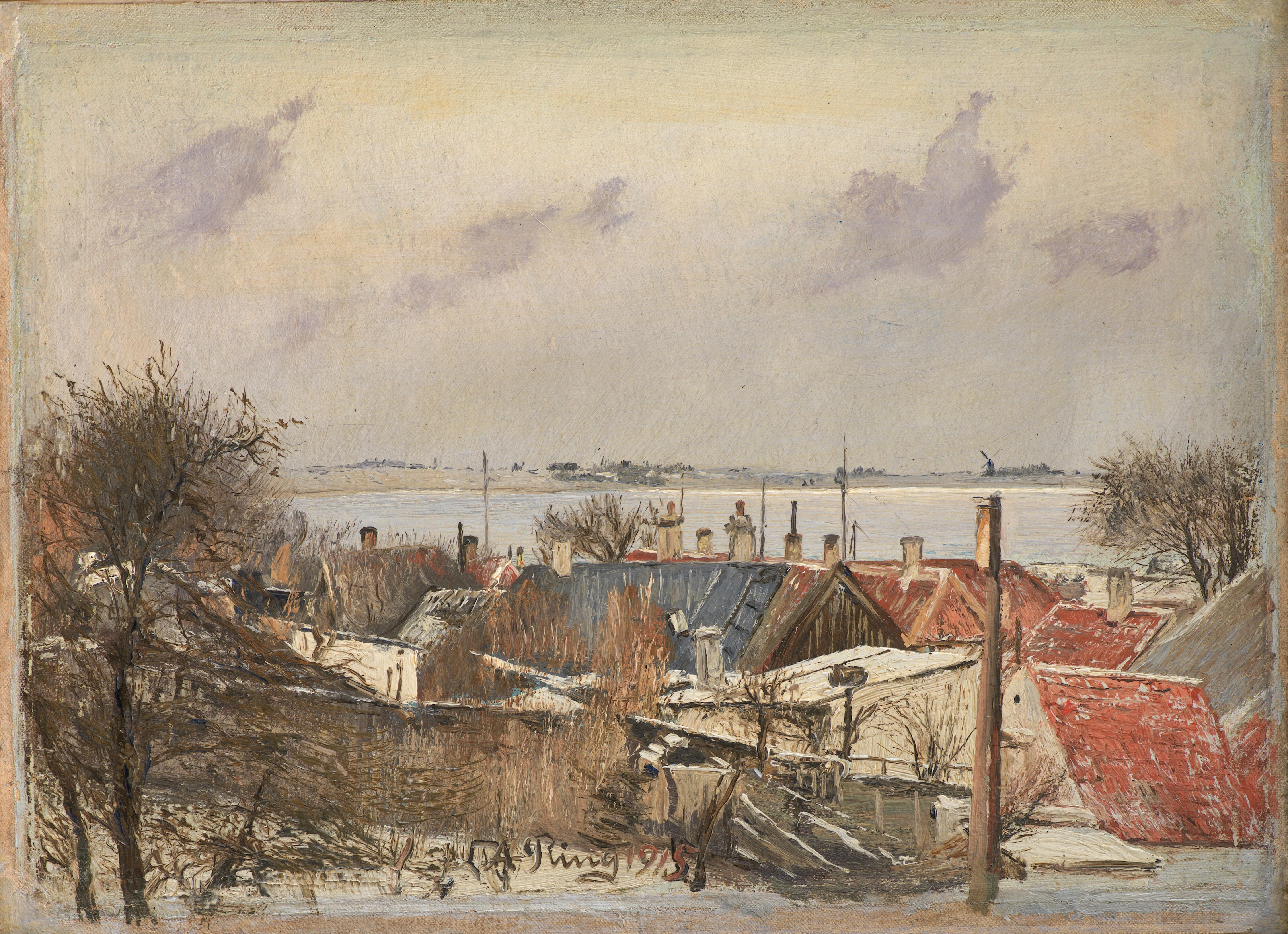 L.A. Ring (1854-1933), Udsigt over Sankt Joergensbjerg og Roskilde Fjord. Vinterdag, 1915